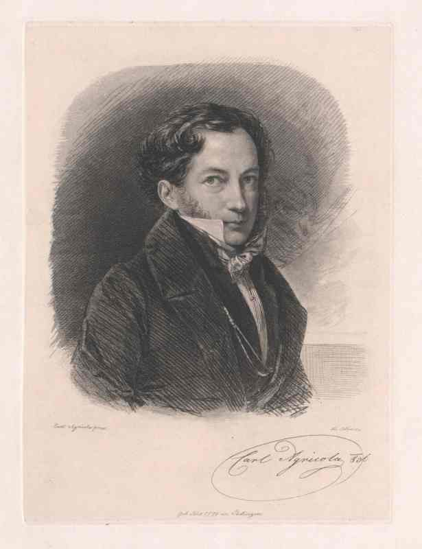 Karl Agricola (* 18. Oktober 1779 in Säckingen; † 15. Mai 1852 in Wien, miniaturist and copper engraver